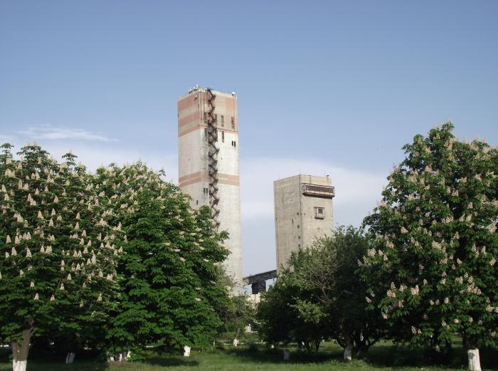 Копер шахти "Красний партизан"